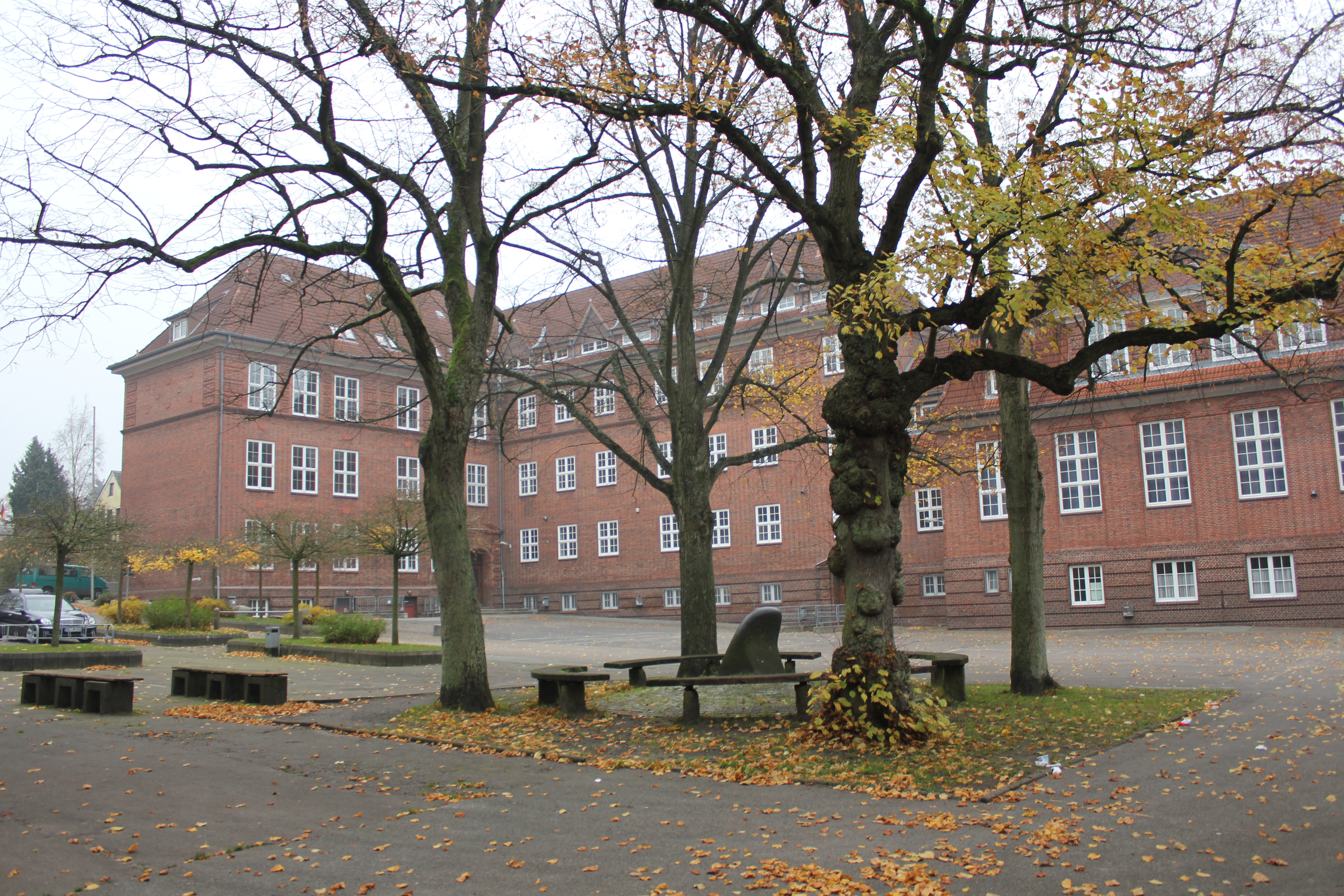 Petrischule (Flensburg) in der Appenrader Straße